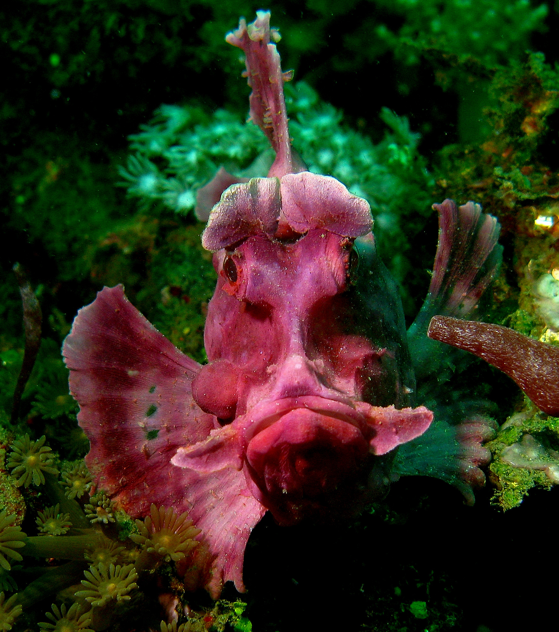 Rhinopia